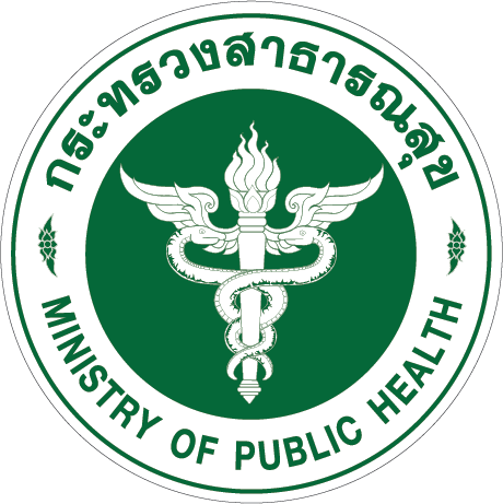 เครื่องหมายราชการกระทรวงสาธารณสุขแบบใหม่ ซึ่งปรับปรุงจากแบบเดิมที่ประกาศใช้ในราชกิจจานุเบกษา เริ่มใช้เมื่อ 27 พฤศจิกายน พ.ศ. 2558